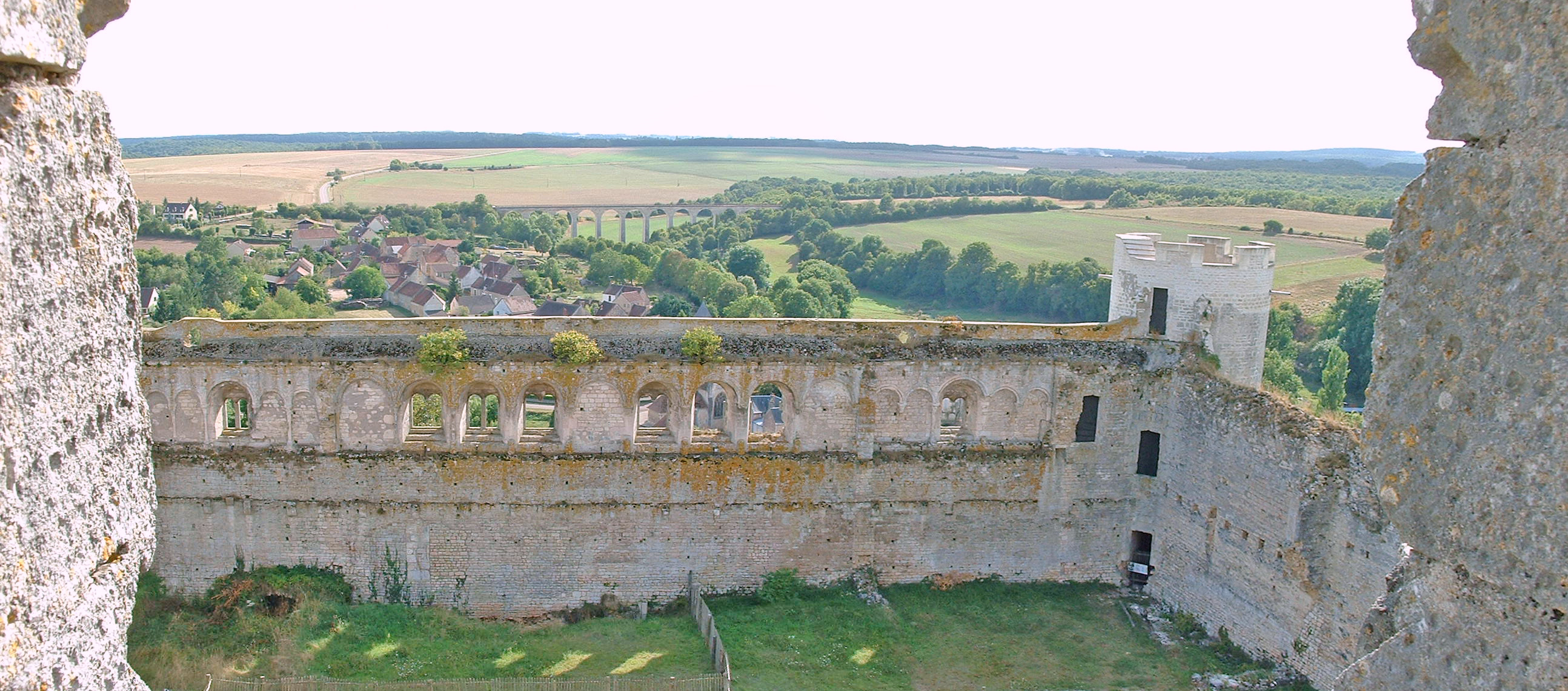 Château-fort de Druyes-les-belles-Fontaines, Yonne) - la galerie romane vue depuis la tour-porche